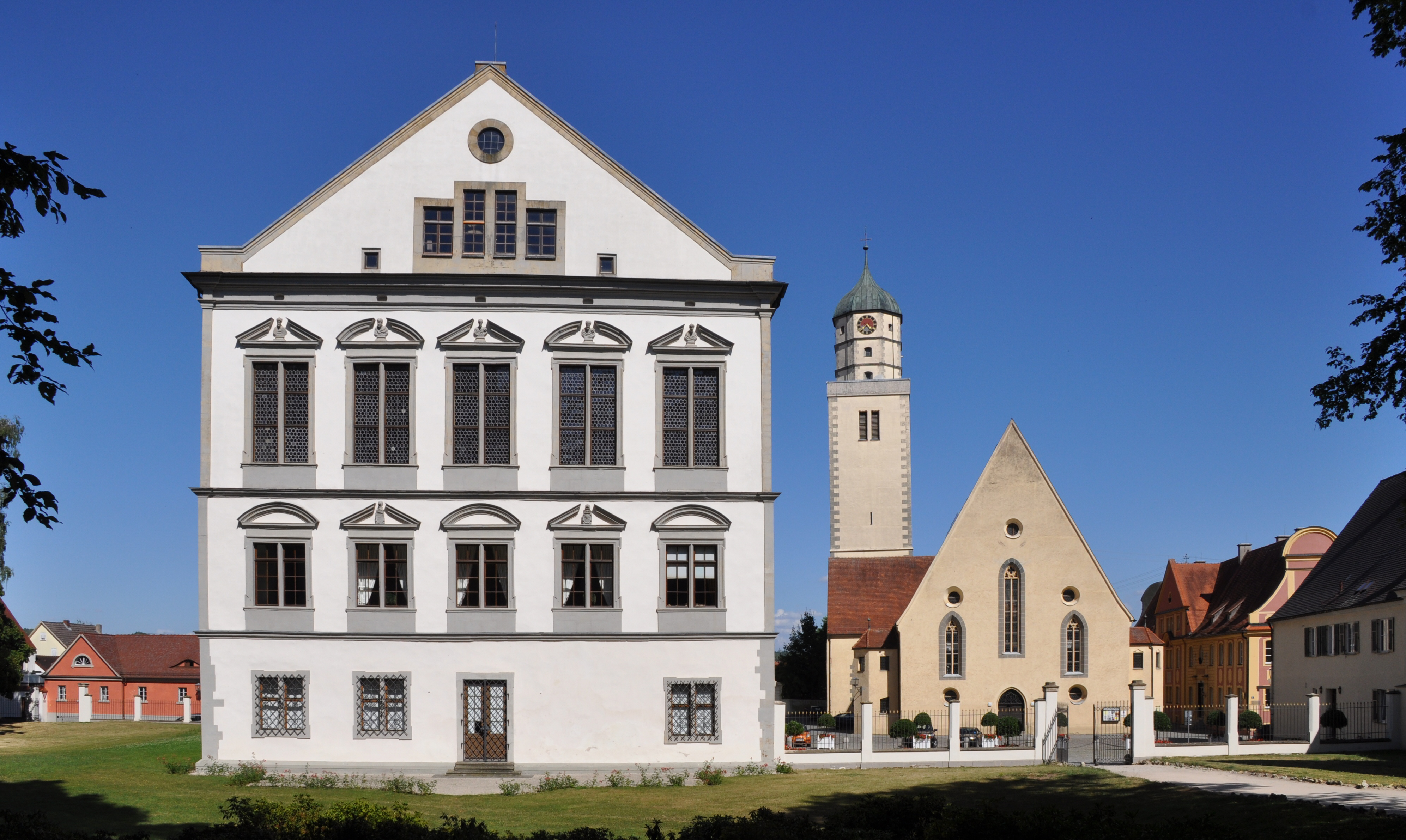 Oettingen in Bayern, Schloss Oettingen und Kirche St. Jakob